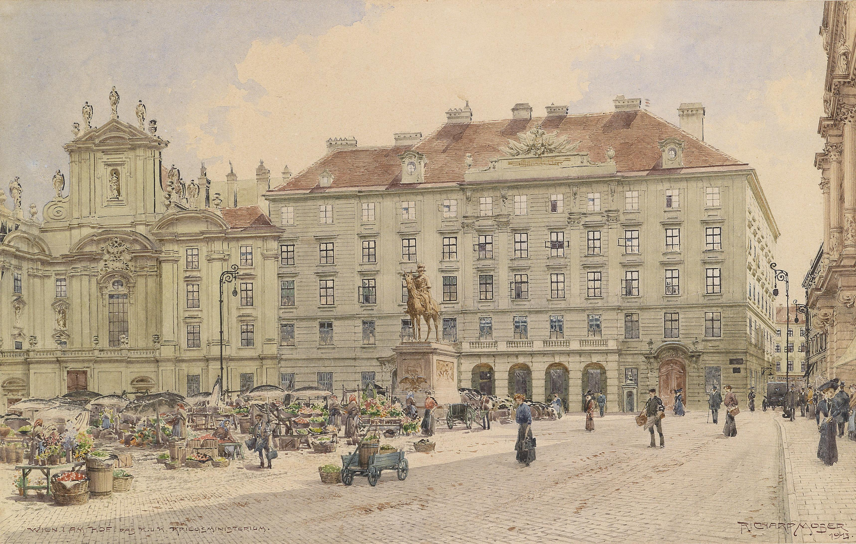 (abgerissen 1913)